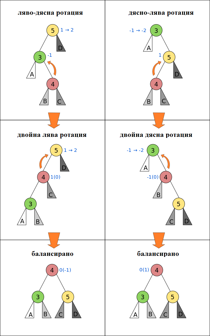 Фигурата не е авторска и е преведена от английски език. Оригиналът на фигурата се намира на адрес